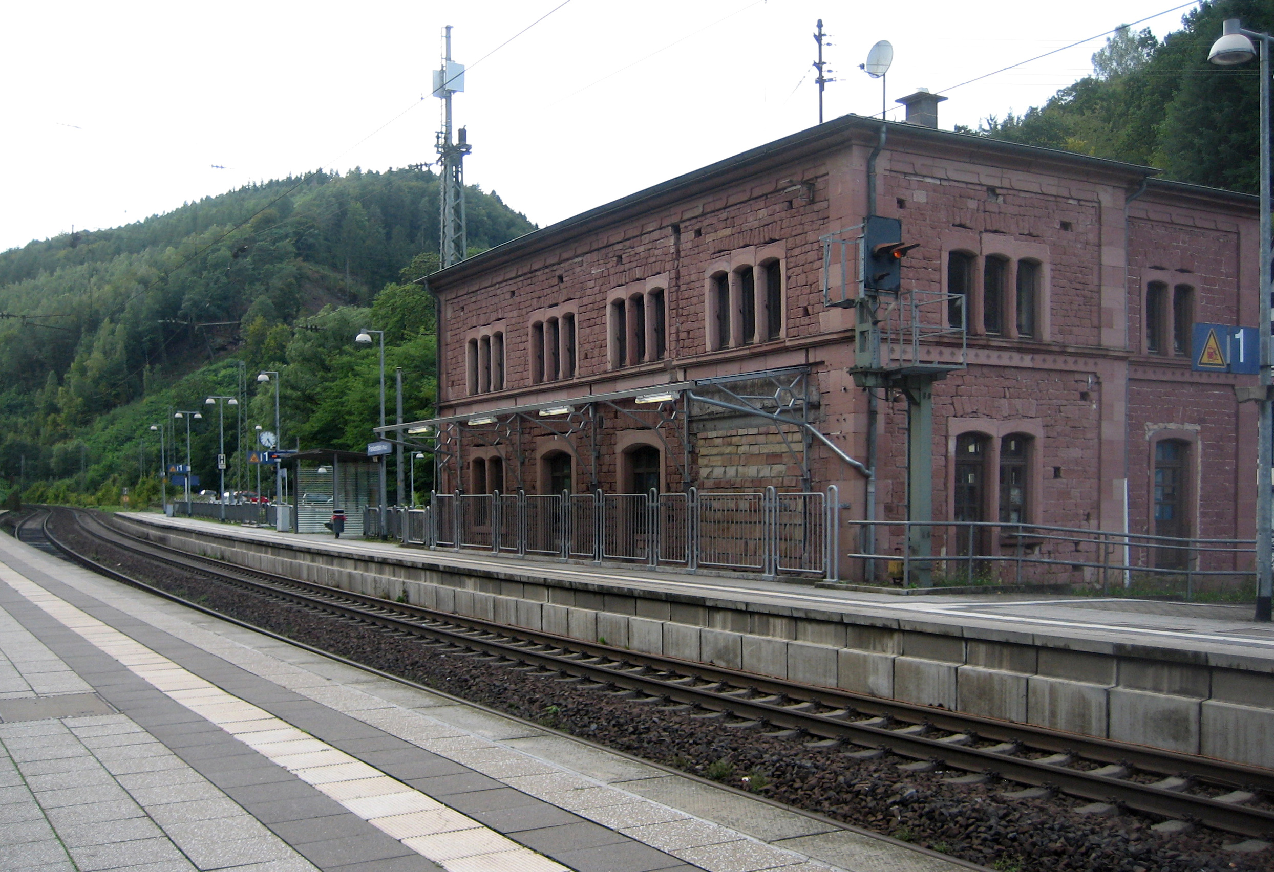 Bezeichnung: Bahnhof Lage: Hauptstraße 9 Ort: Frankenstein Bauzeit: drittes Viertel des 19. Jahrhunderts Beschreibung:zweieinhalbgeschossiger spätklassizistischer Walmdachbau mit Giebelrisalit, wohl aus dem dritten Viertel des 19. Jahrhunderts